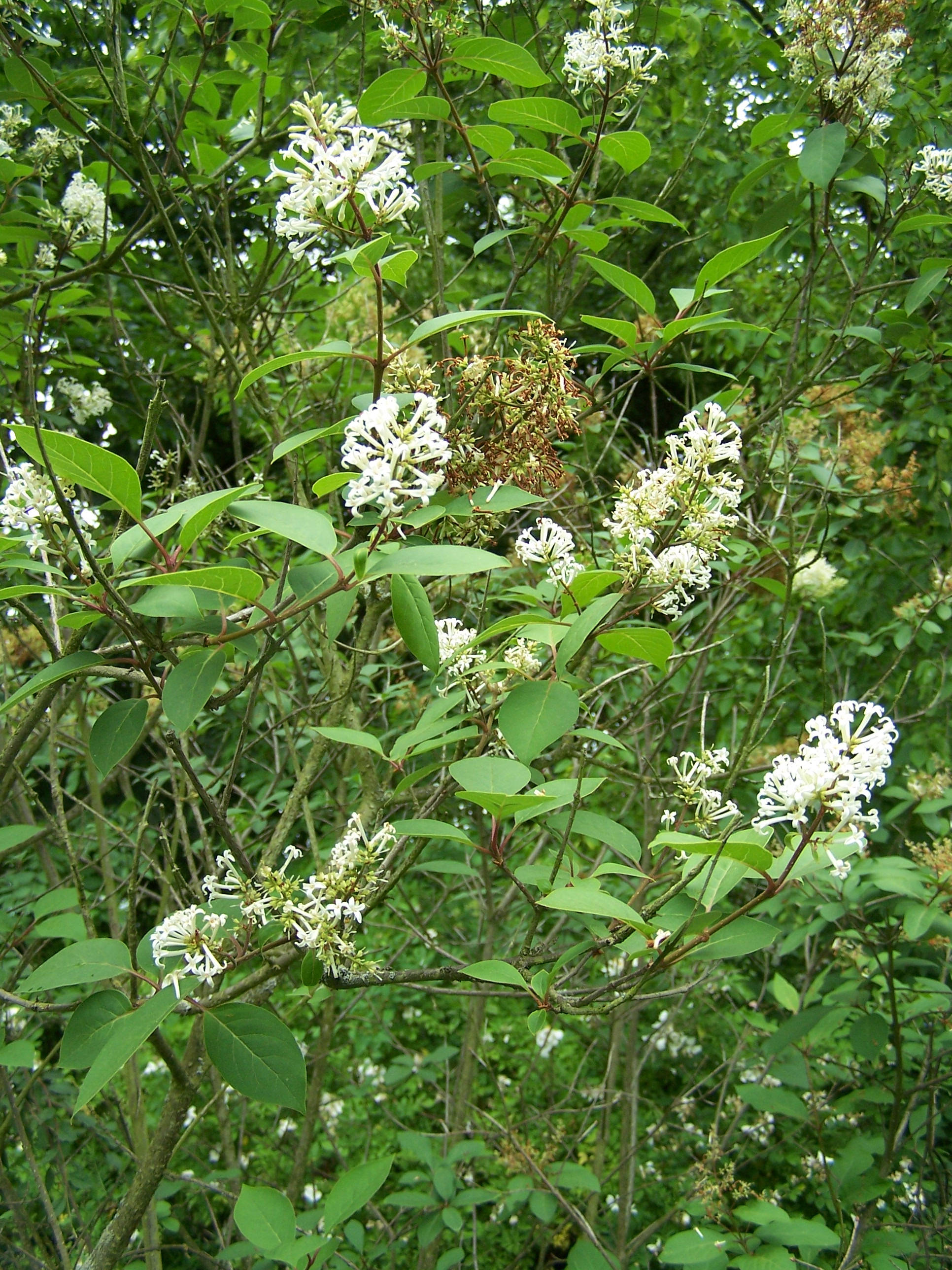 Syringa emodi (West of Himalaya) 17 juin 2006 Vieux jardin botanique de Göttingen